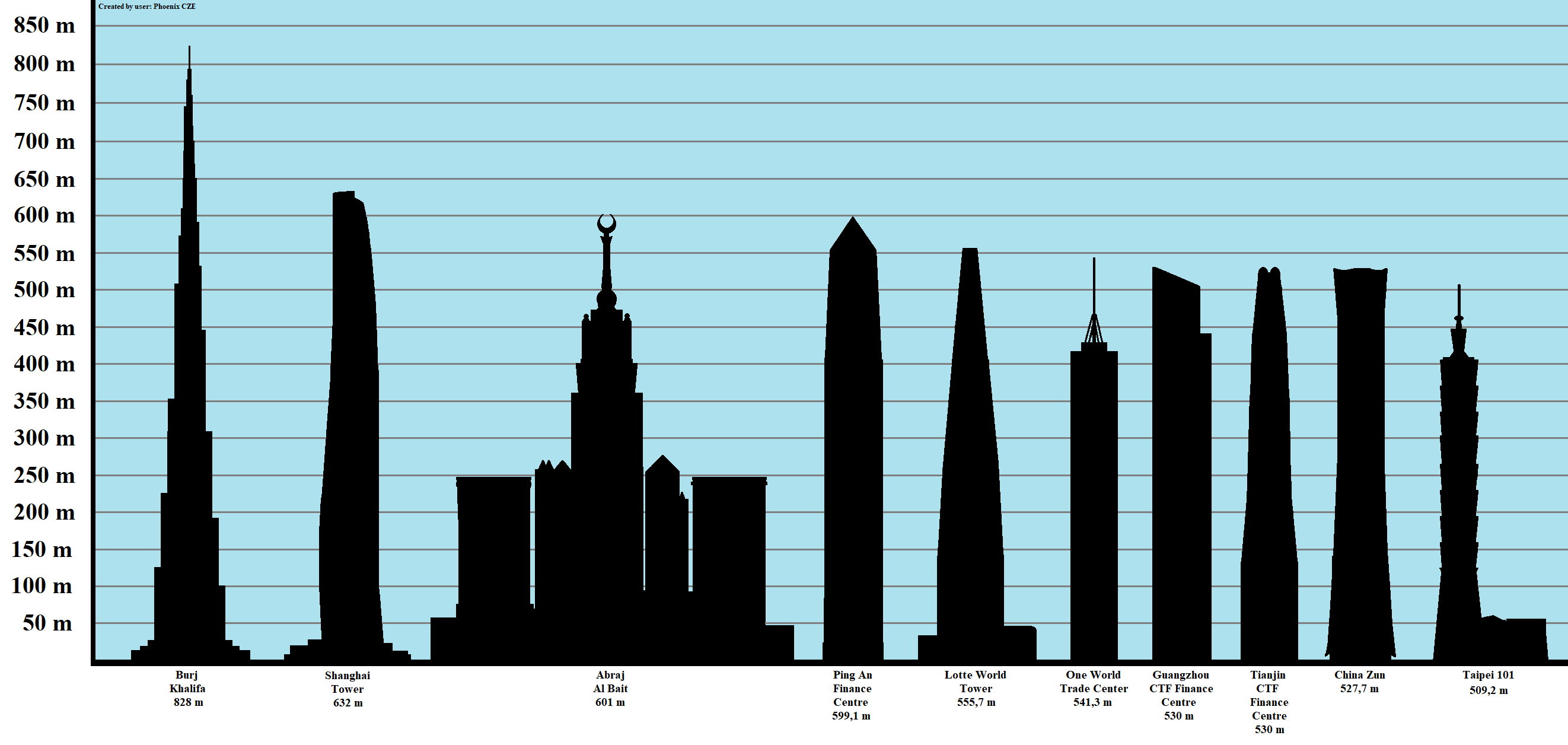 Tallest Buildings in the World 2020